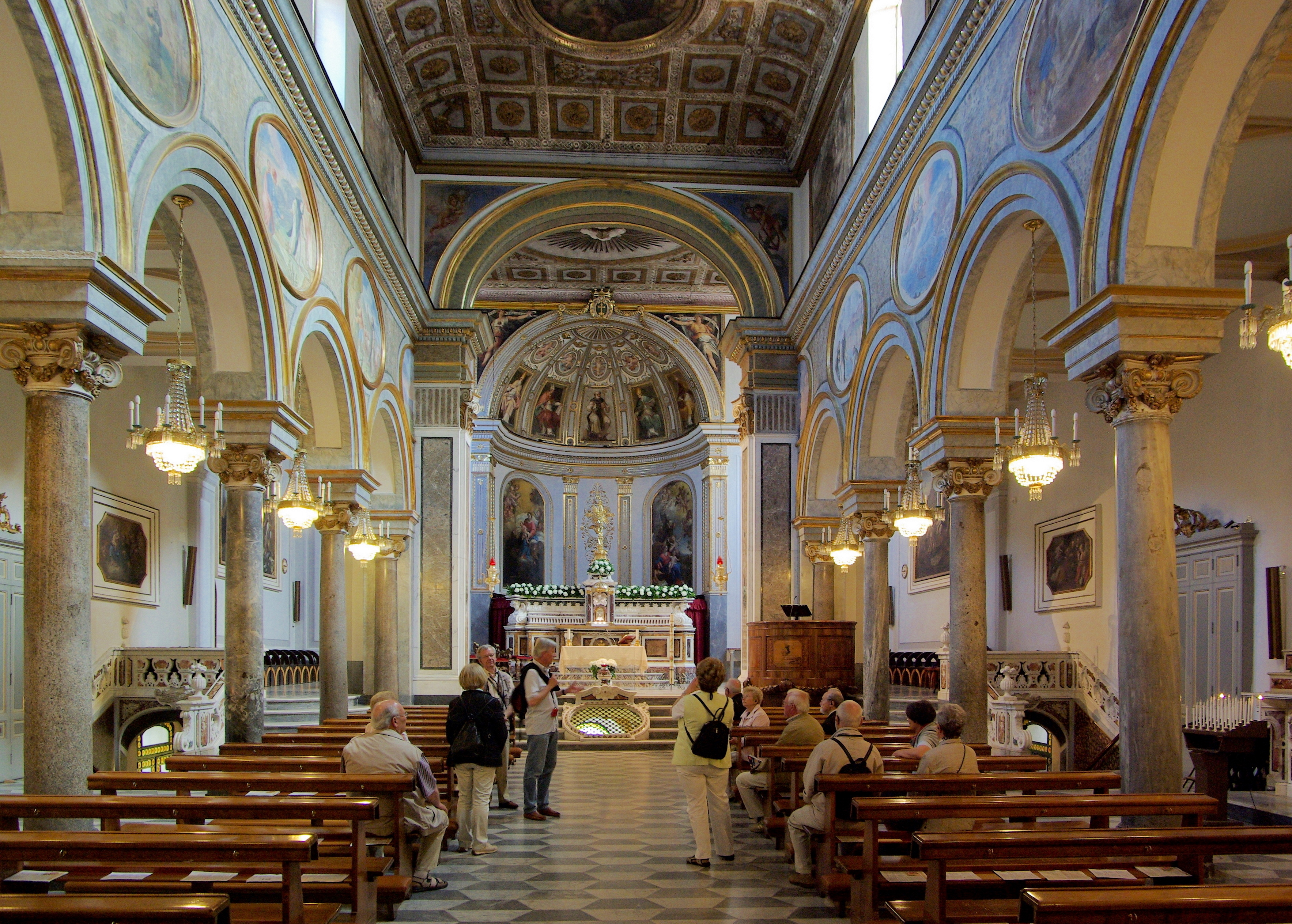 Sorrento, Chiesa S. Antonino